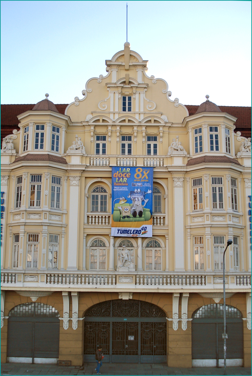 Detalhe da fachada do Edifício Ely, obra de Theodor Wiederspahn, Porto Alegre, Brasil.